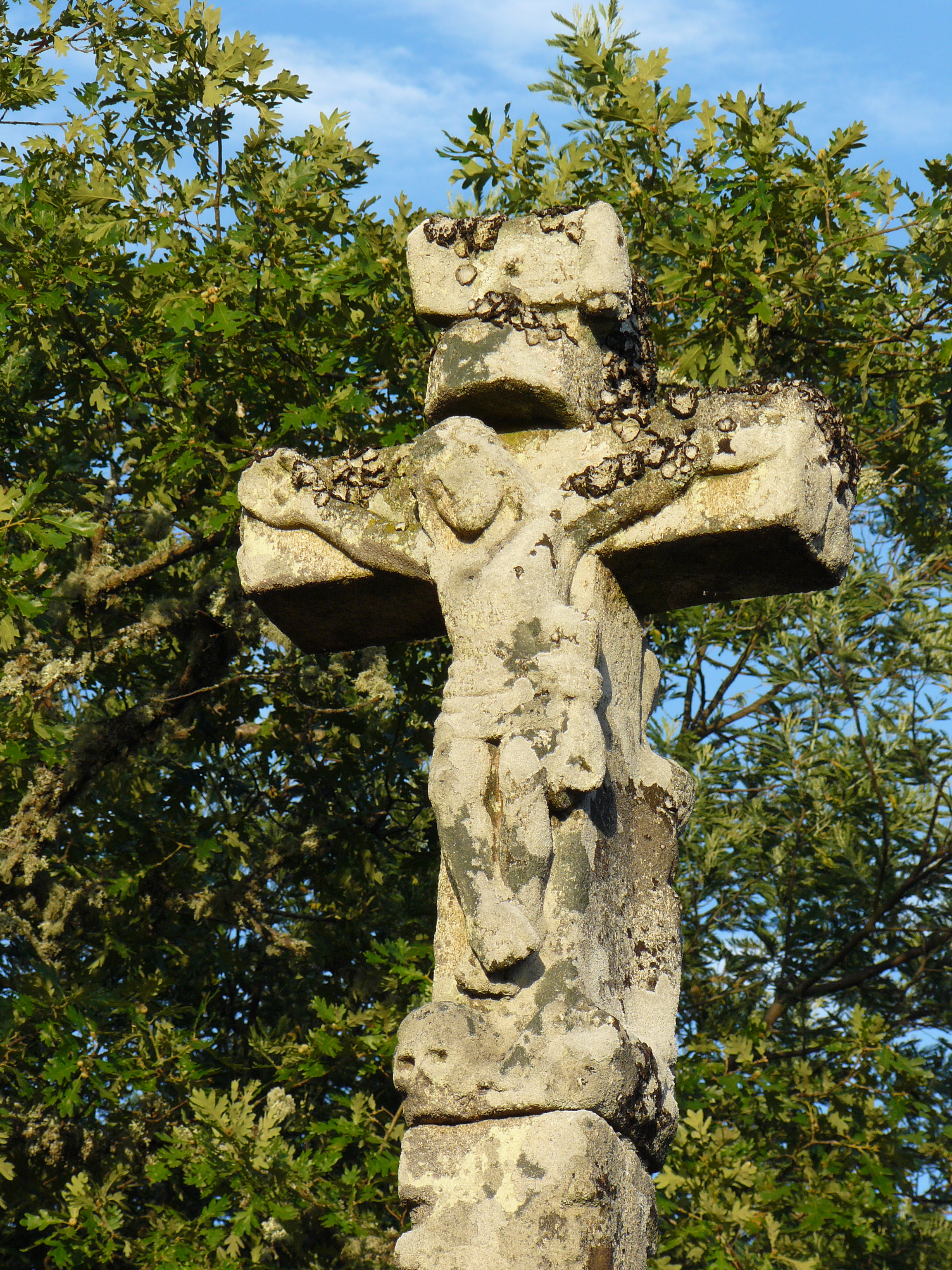 Detalle del Crucificado del cruceiro de San Miguel de Osmo, Cenlle - Ourense - Galicia